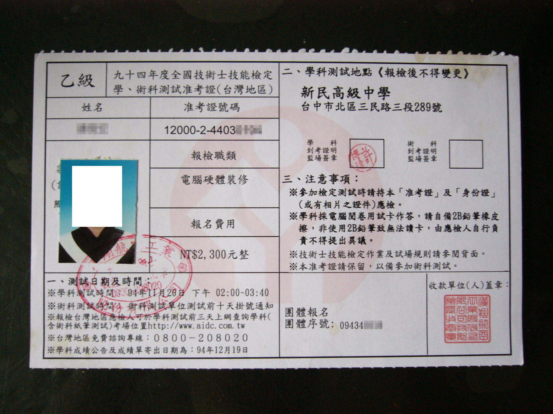 中華民國行政院勞工委員會製發的「九十四年度全國技術士技能檢定」乙級准考證正面，中央浮水印為行政院勞工委員會標誌。